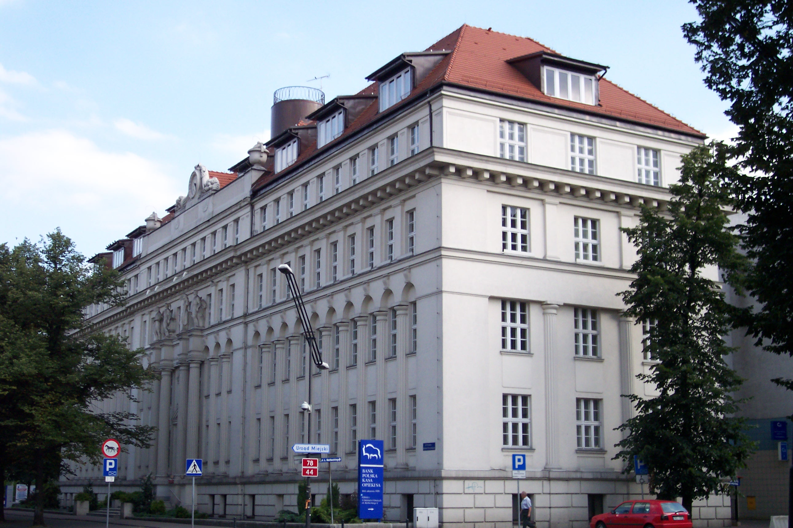 Wojewódzki Sąd Administracyjny w Gliwicach